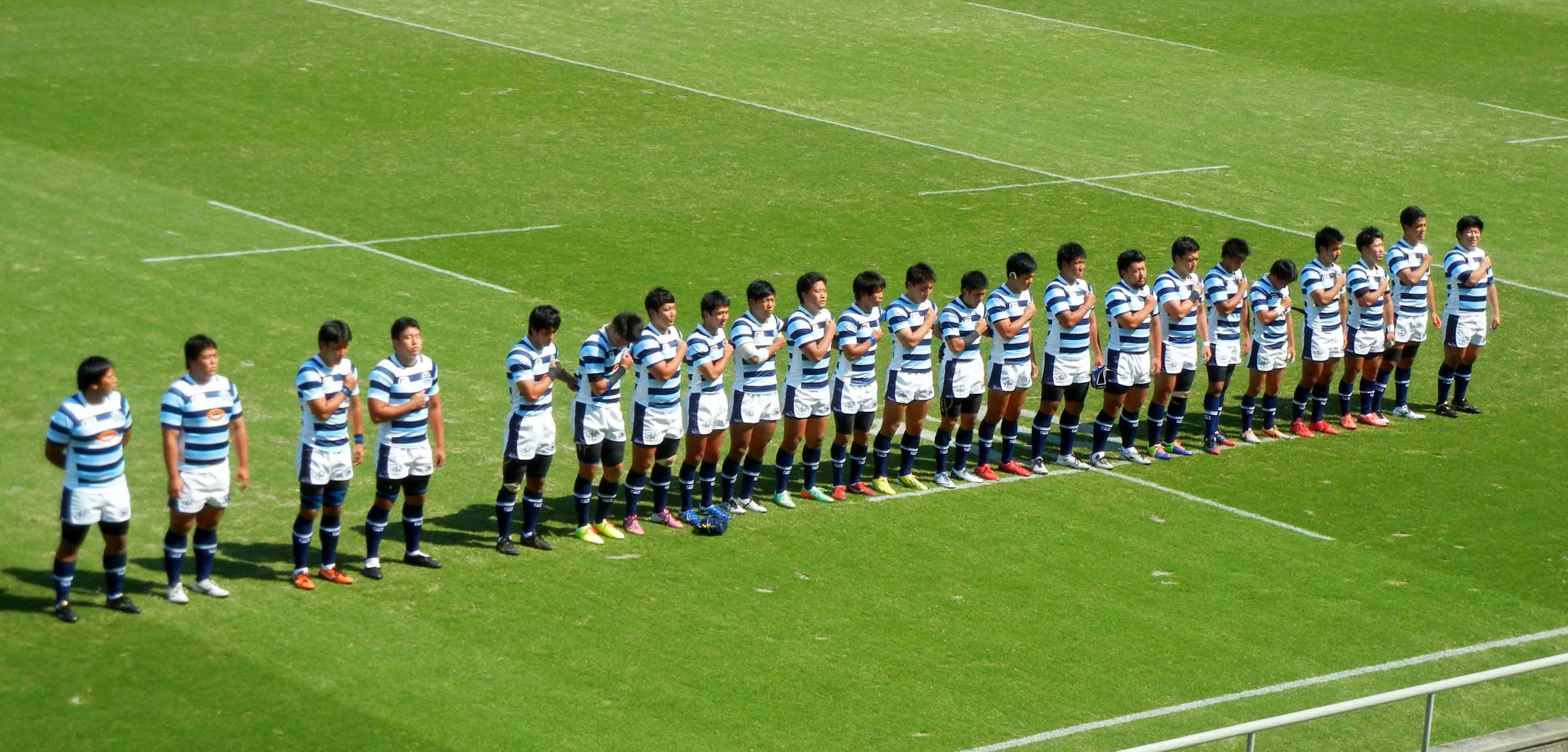 試合前の中央の選手達